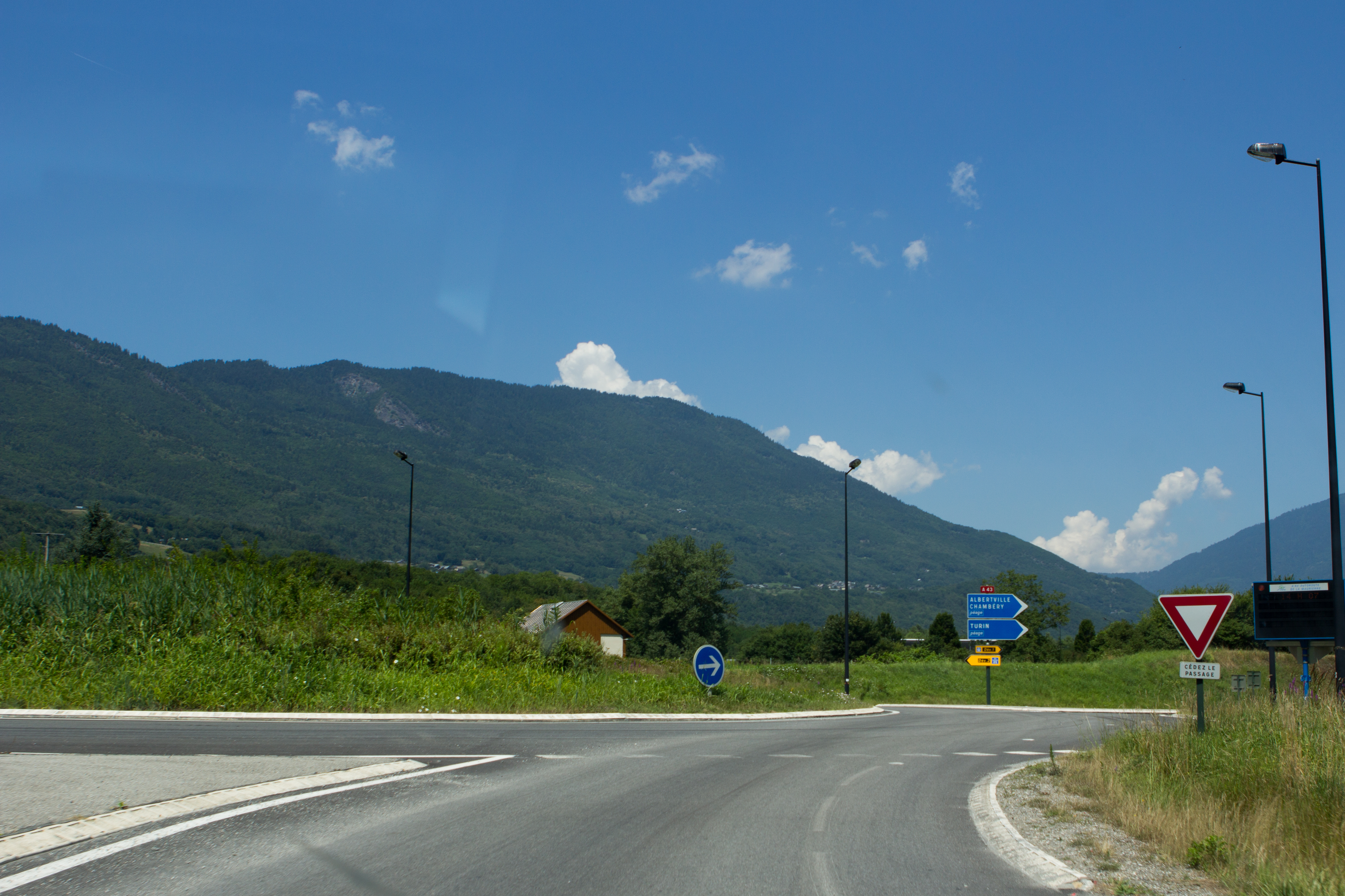 Vue du massif des Hurtières et de Saint-Georges d'Hurtières / Saint-Georges d'Hurtières, Savoie, France